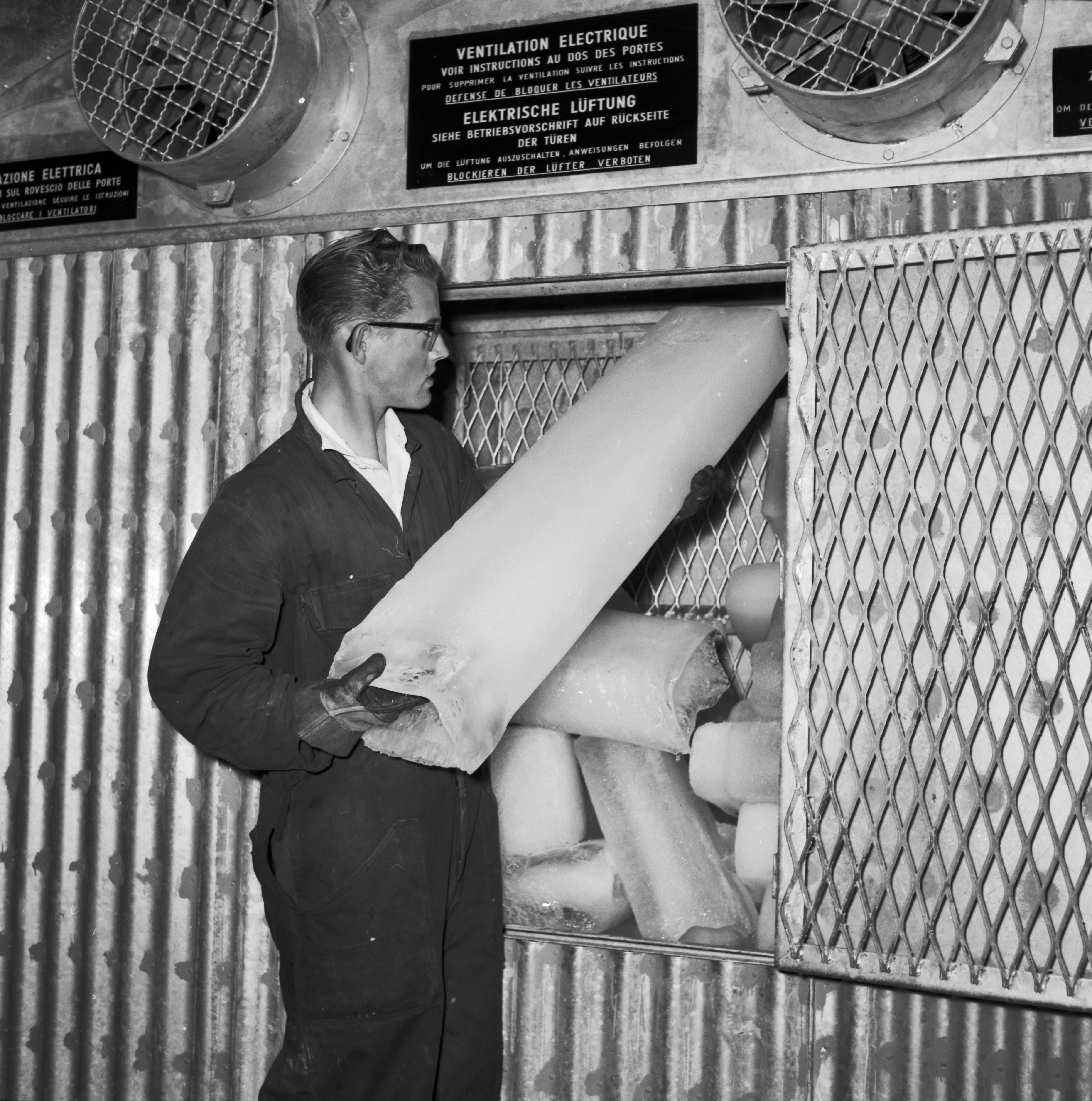 Afbeelding van het beladen van de ijsbunker van een koelwagen van Interfrigo met ijs bij de firma Linthorst te Breda.